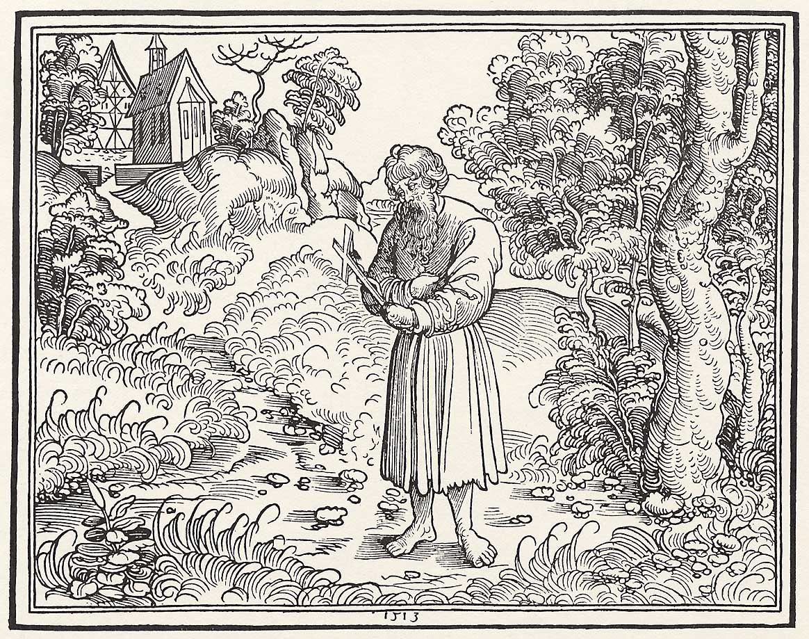 Einsiedler